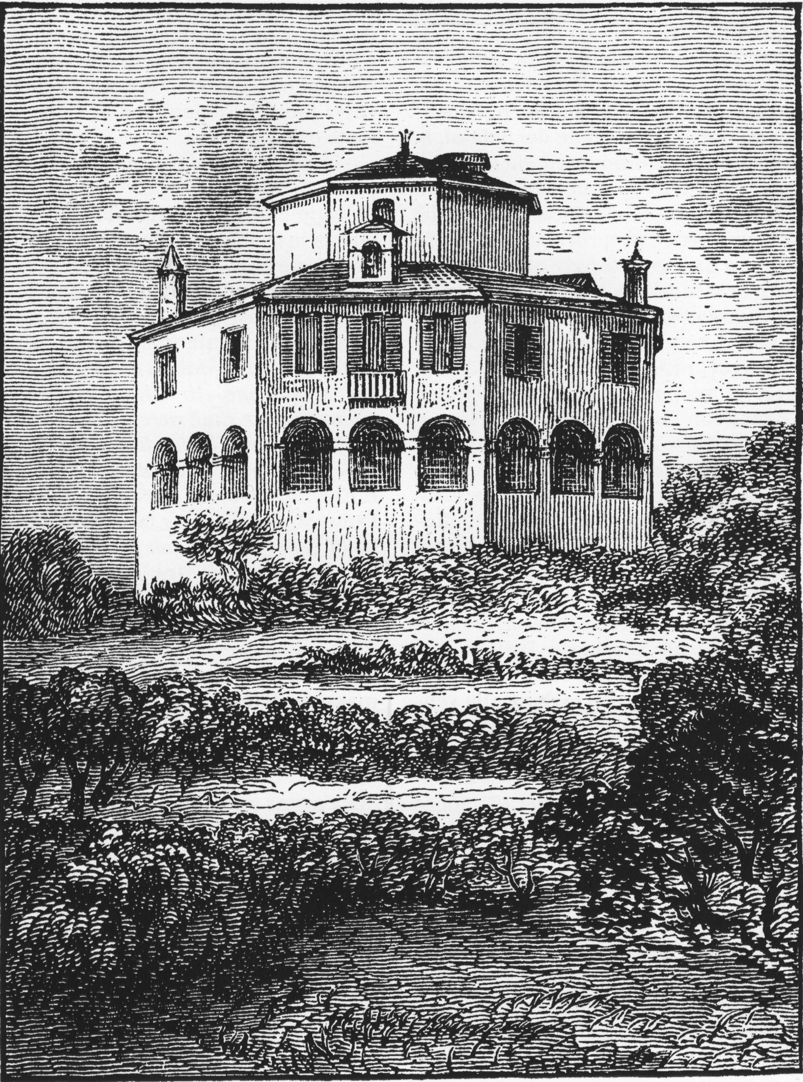 incisione su legno di anonimo della metà dell'Ottocento (ante 1877) raffigurante il Castello di Montfleury, Aosta, Valle d'Aosta, Italia.